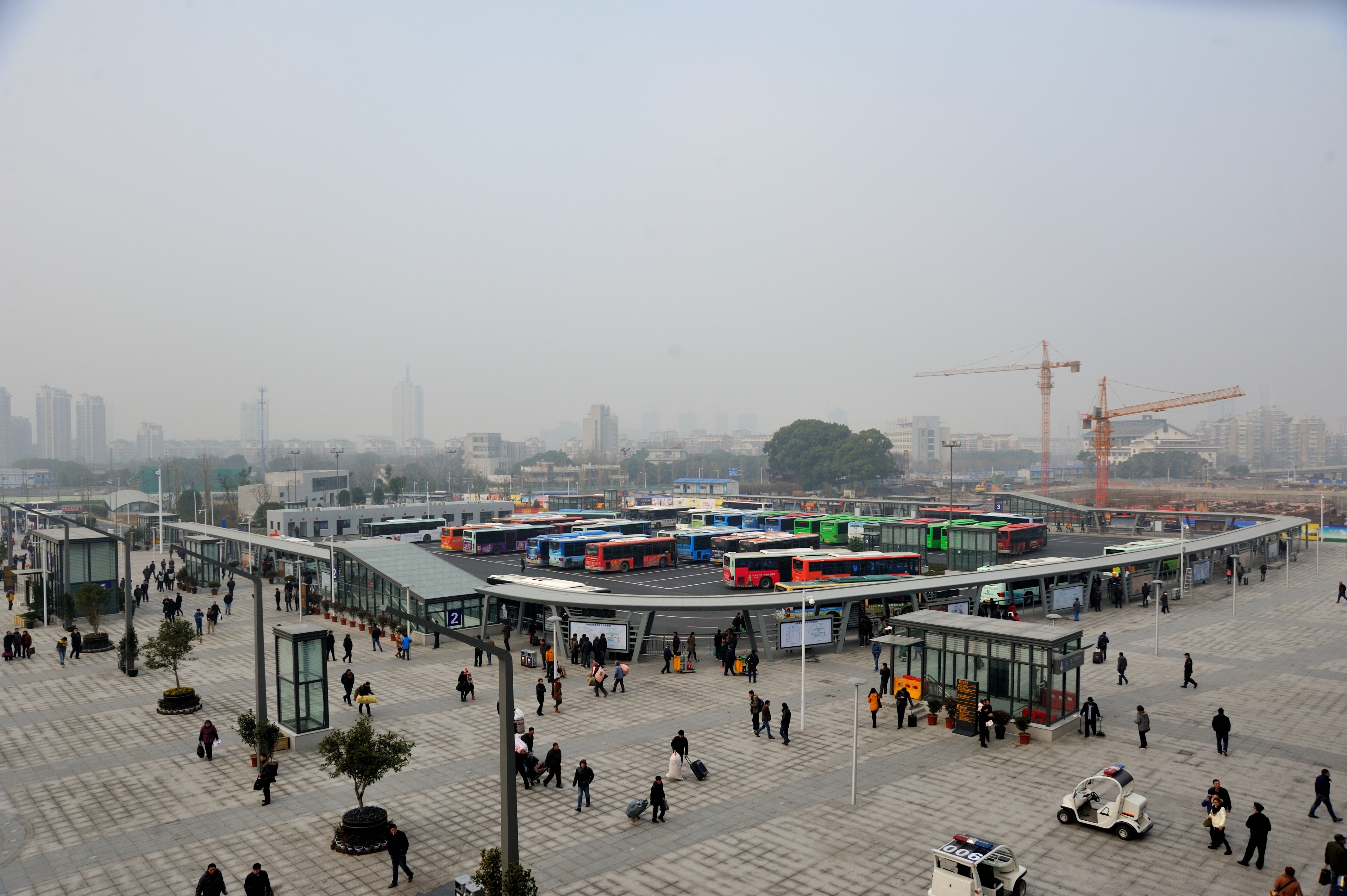 宁波站公交站场